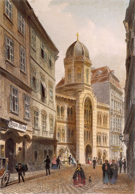 Griechenkirche zur heiligen Dreifaltigkeit, Wien, Fleischmarkt